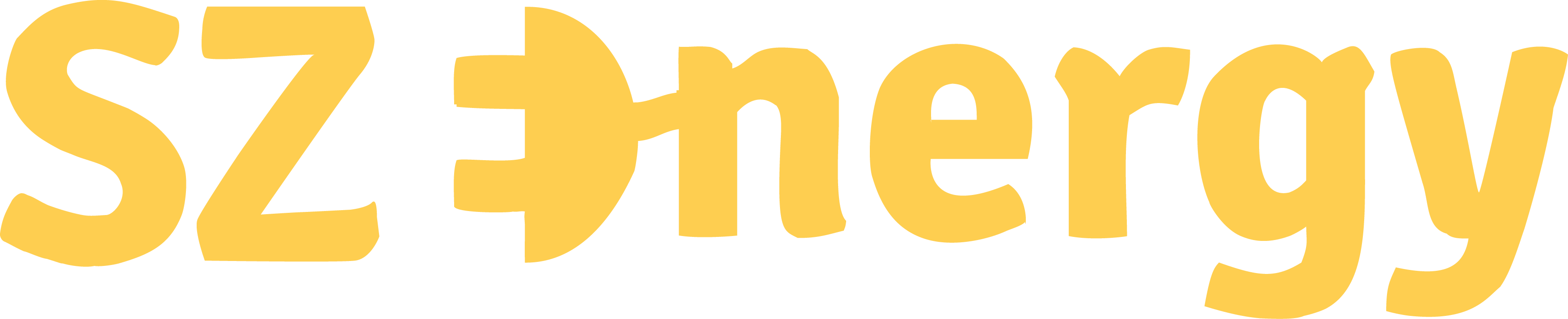 csapat Logó